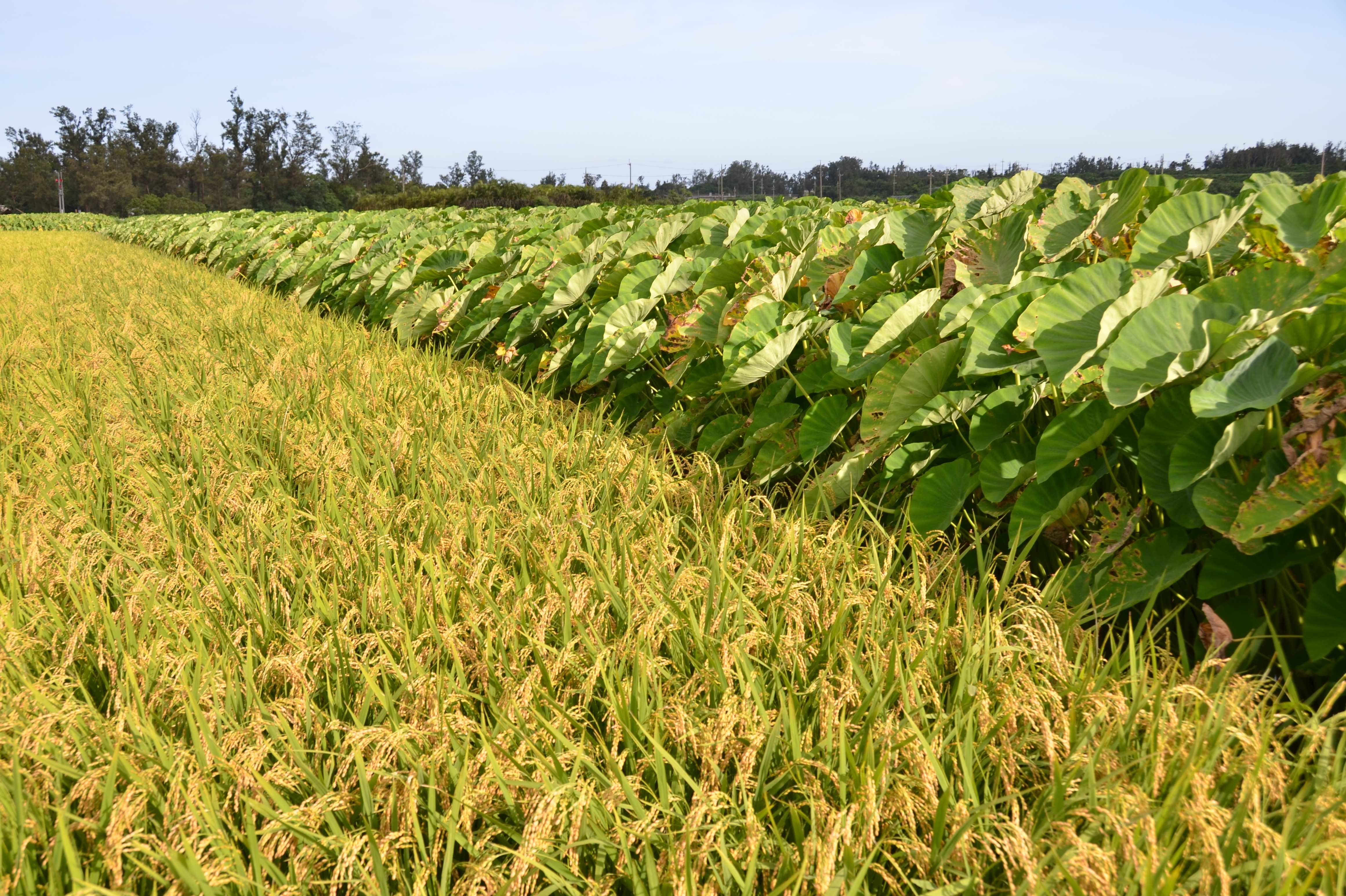 沖縄県金武町福花原（フッカバル）の田園風景。手前が稲、奥が田芋。